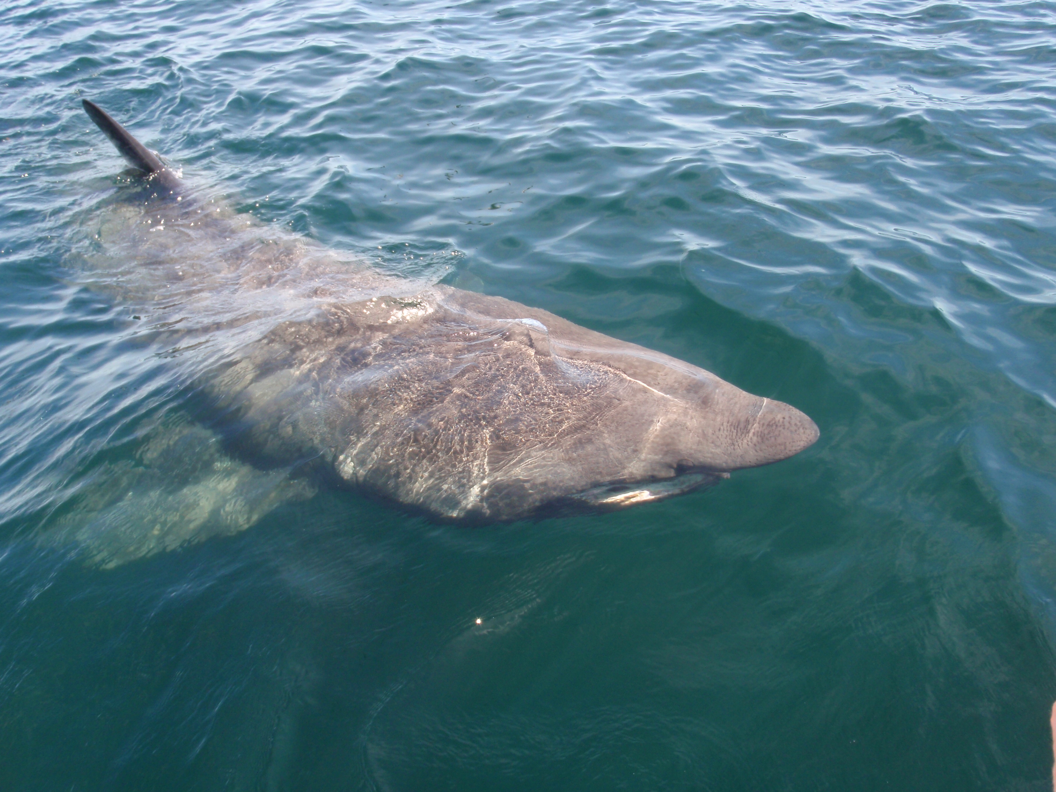 Basking shark (Cetorhinus maximus)